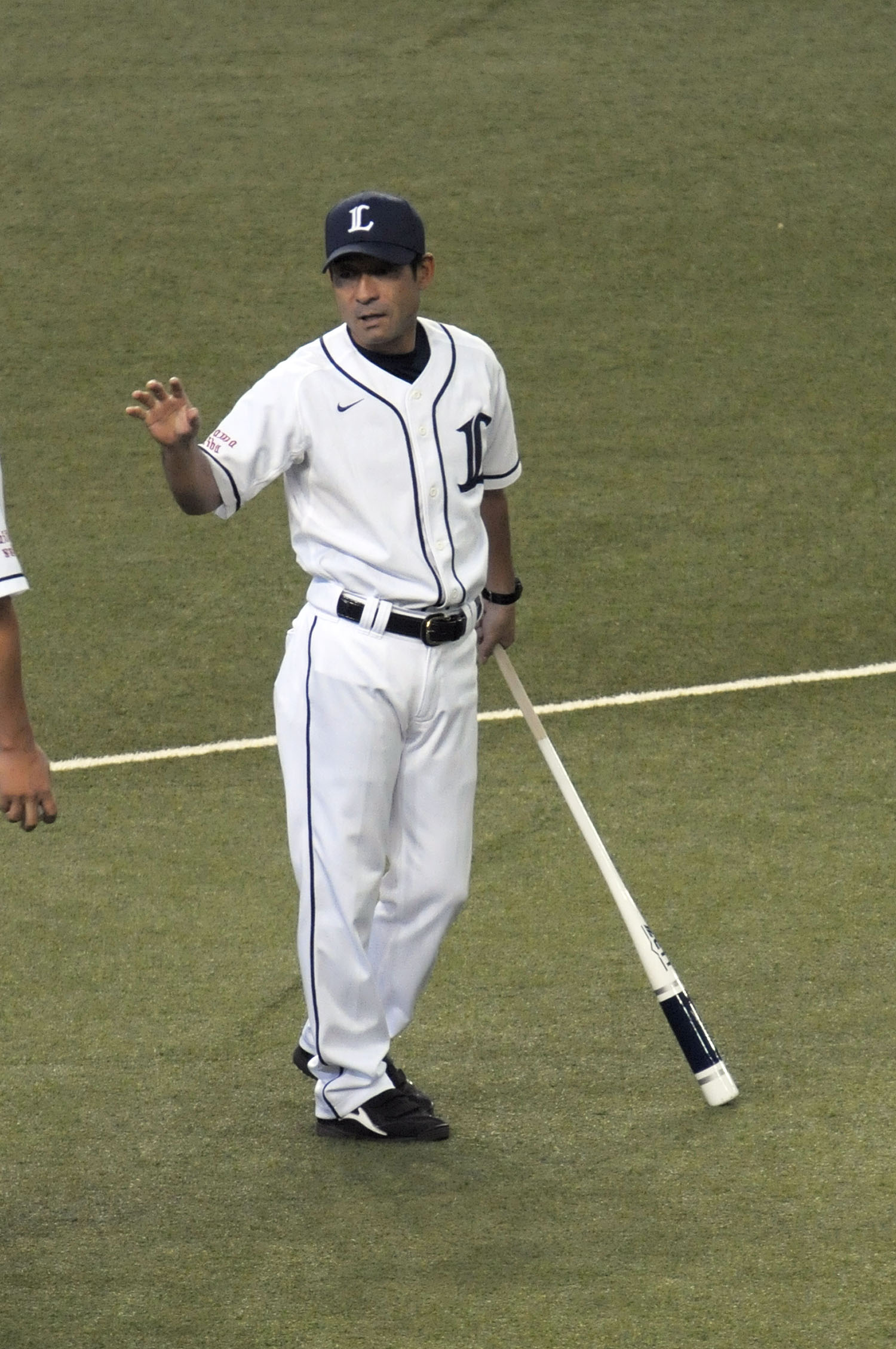 埼玉西武ライオンズ、奈良原浩コーチ。西武ドームで。